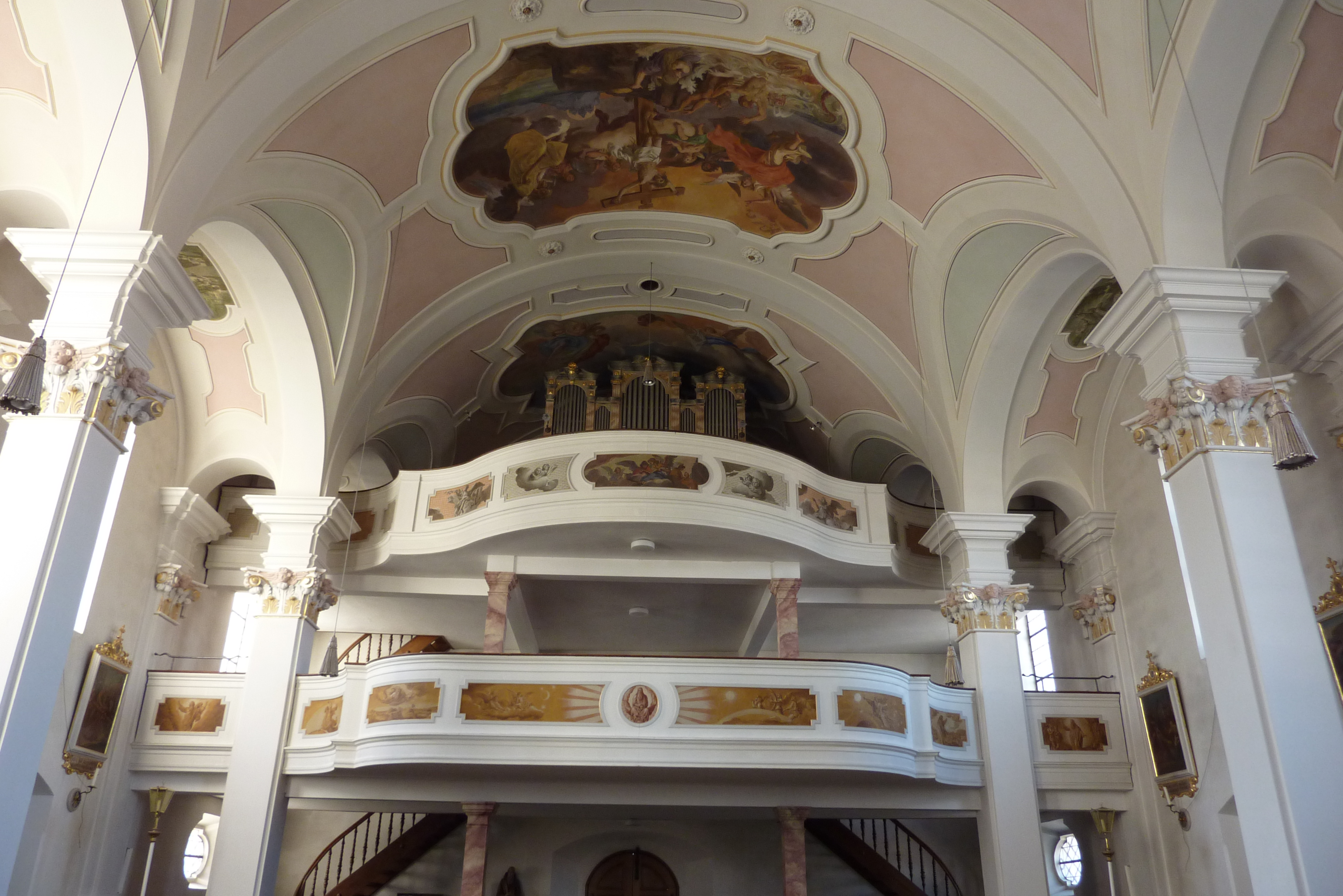 Blindheim, Pfarrkirche St. Martin, Doppelempore im Westen